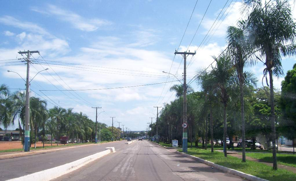 Rodovia Belém Brasília em Gurupi Tocantins, Brasil.